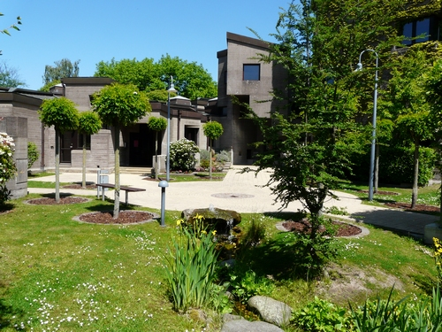 Die Abbildung stellt den Eingangsbereich nach der Umgestaltung 2003 dar.